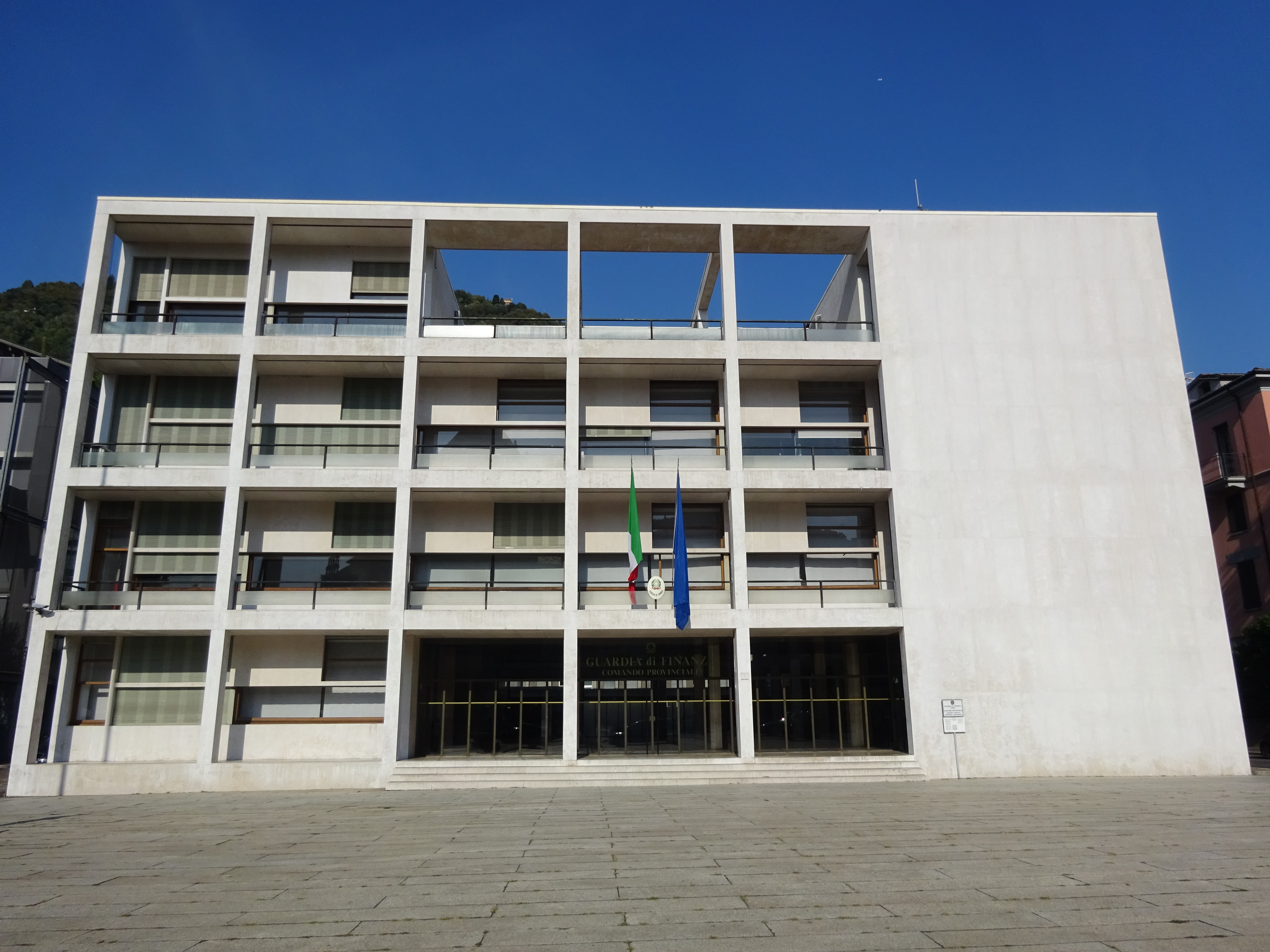 Casa del Fascio This is a photo of a monument which is part of cultural heritage of Italy.